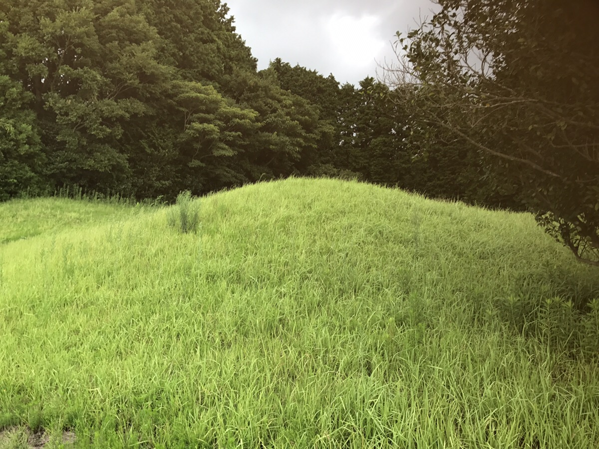 四ツ塚古墳（沼津市）